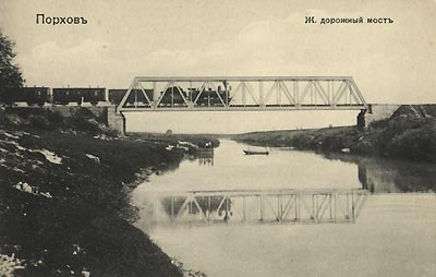 Железнодорожный мост через Шелонь в Порхове. Дореволюционная открытка